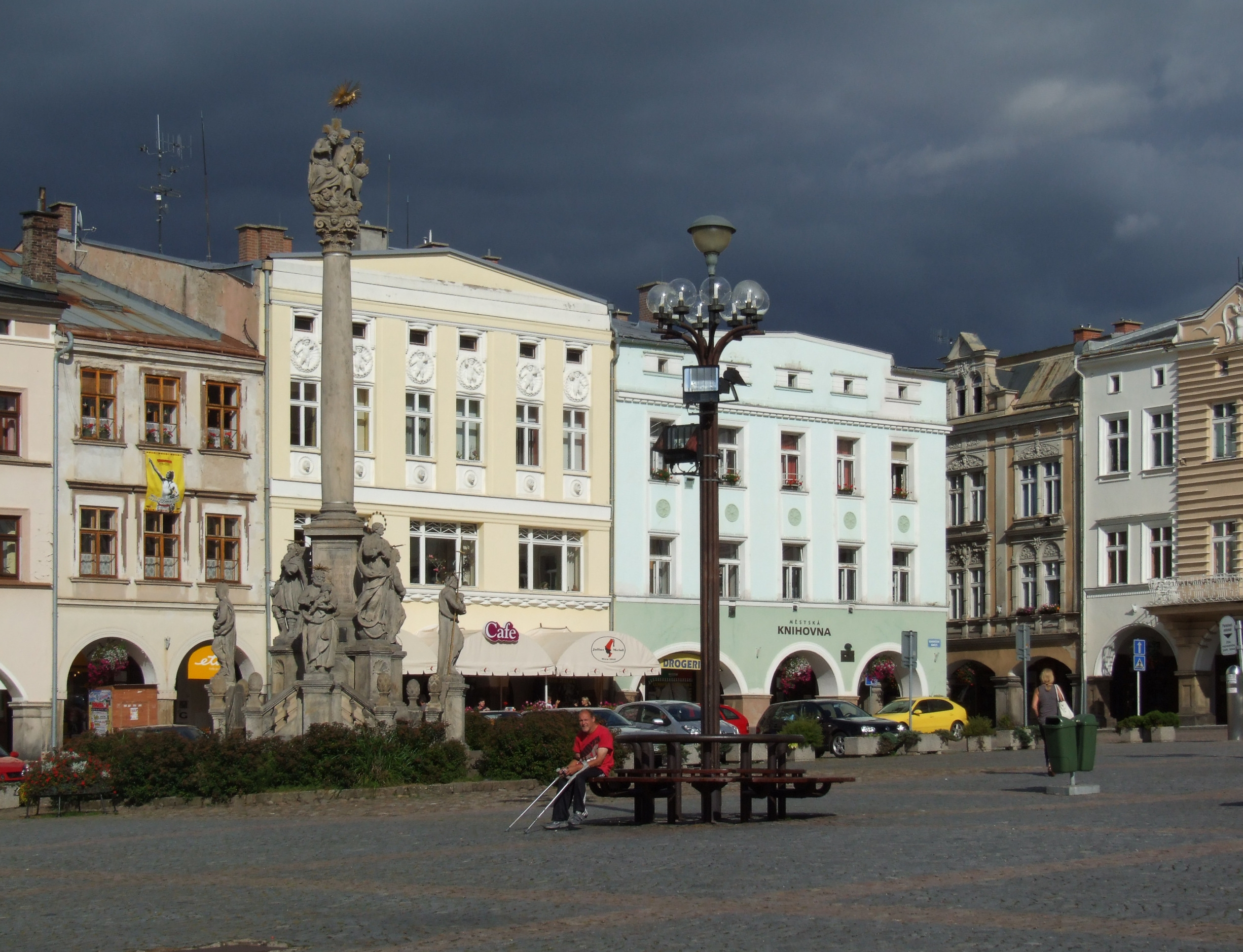 Trutnov (Trautenau) - Krakonošovo náměstí